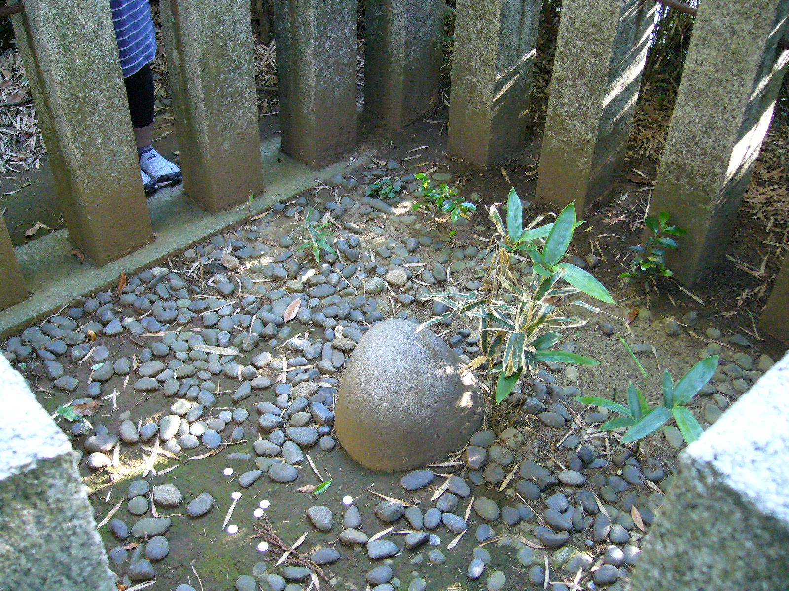 kaname-ishi,katori-jingu,katori-city.japan